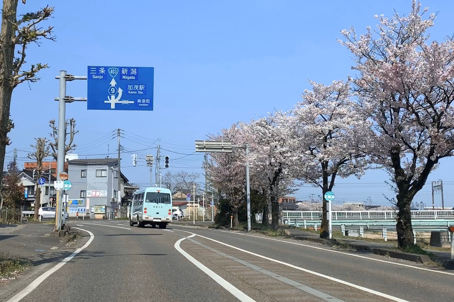 新潟県道9号長岡栃尾巻線 加茂市穀町付近と加茂市営市民バス（2020年4月）